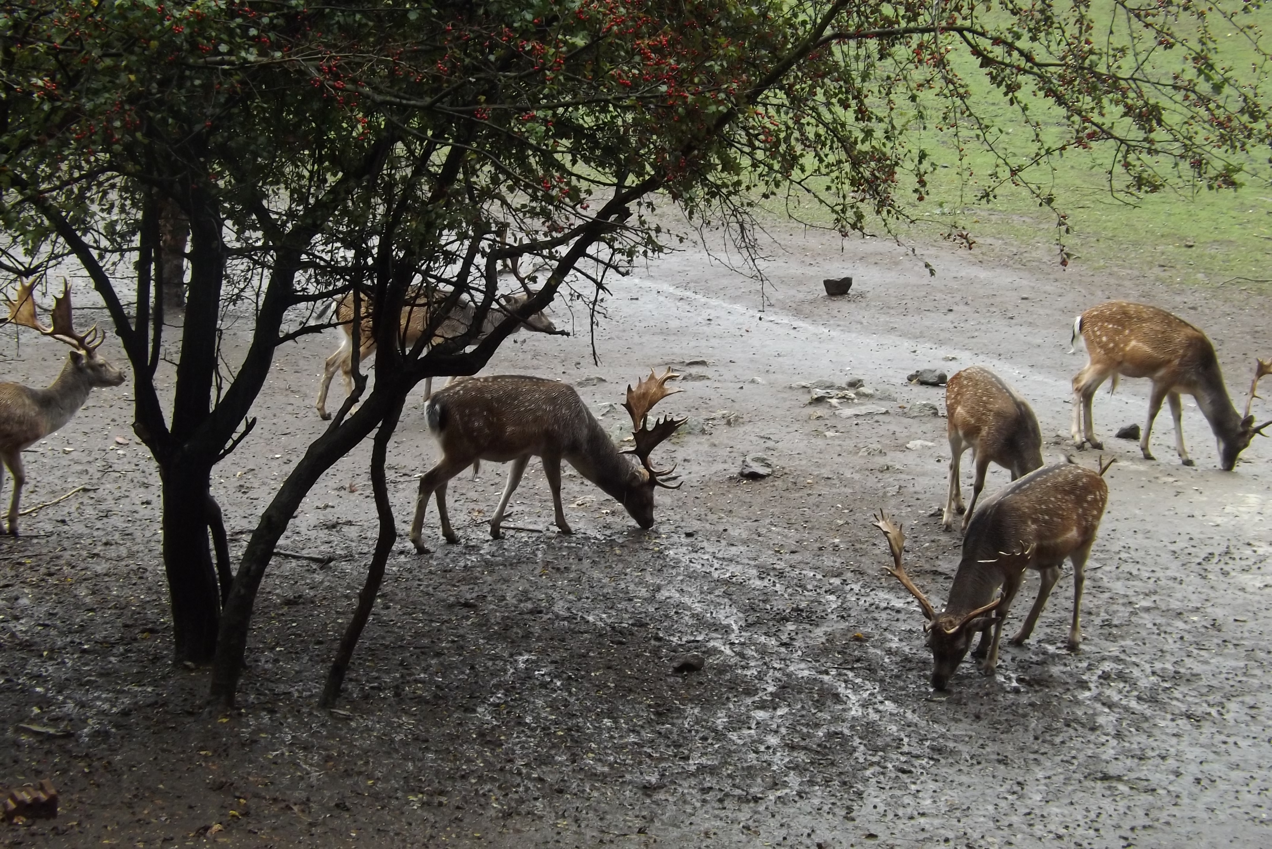 Sály, Latorpuszta, Vadaskert, dámszarvasok